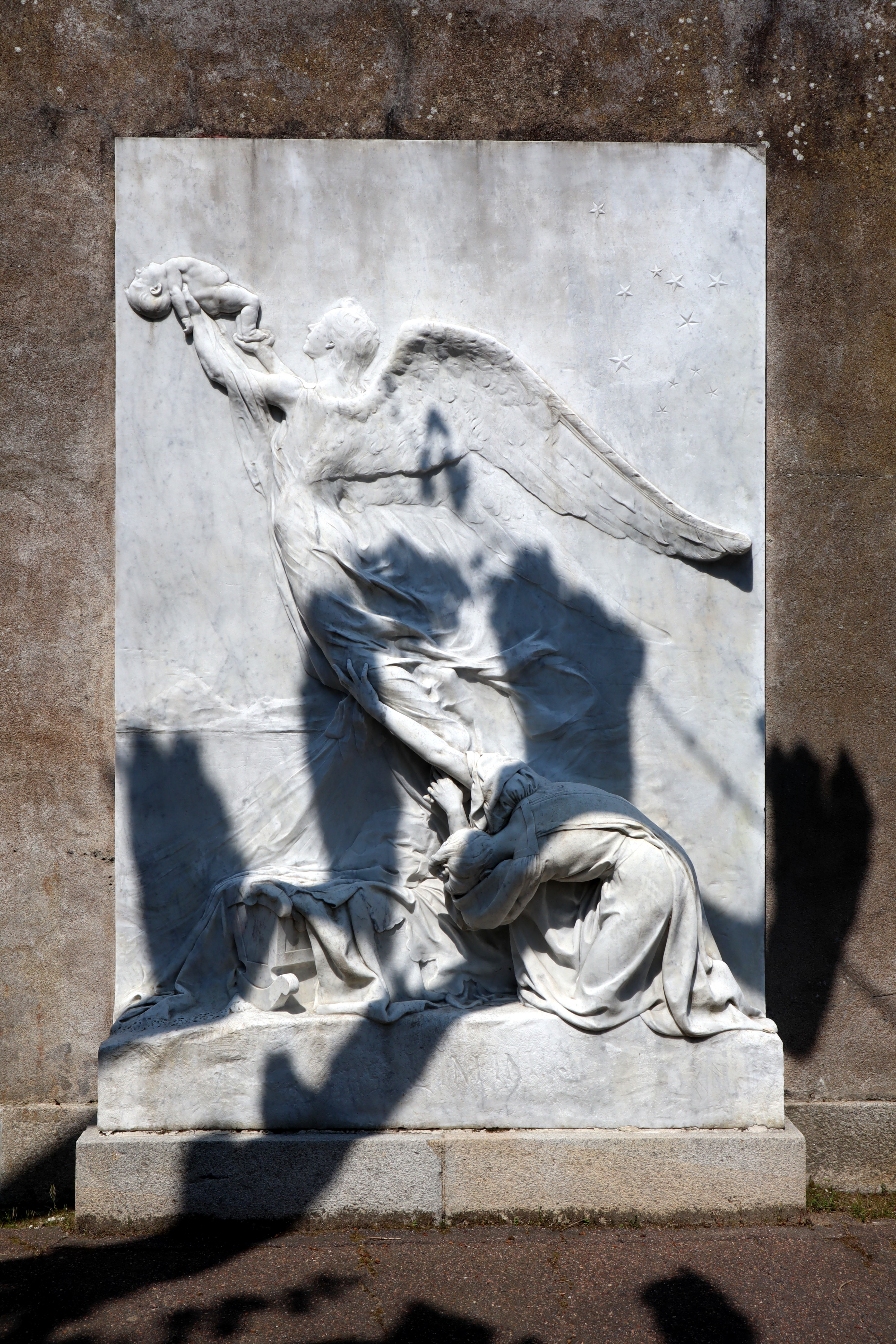 Vers l'infini. Bas-relief de Blanche Moria au cimetière La Bouteillerie à Nantes (44).